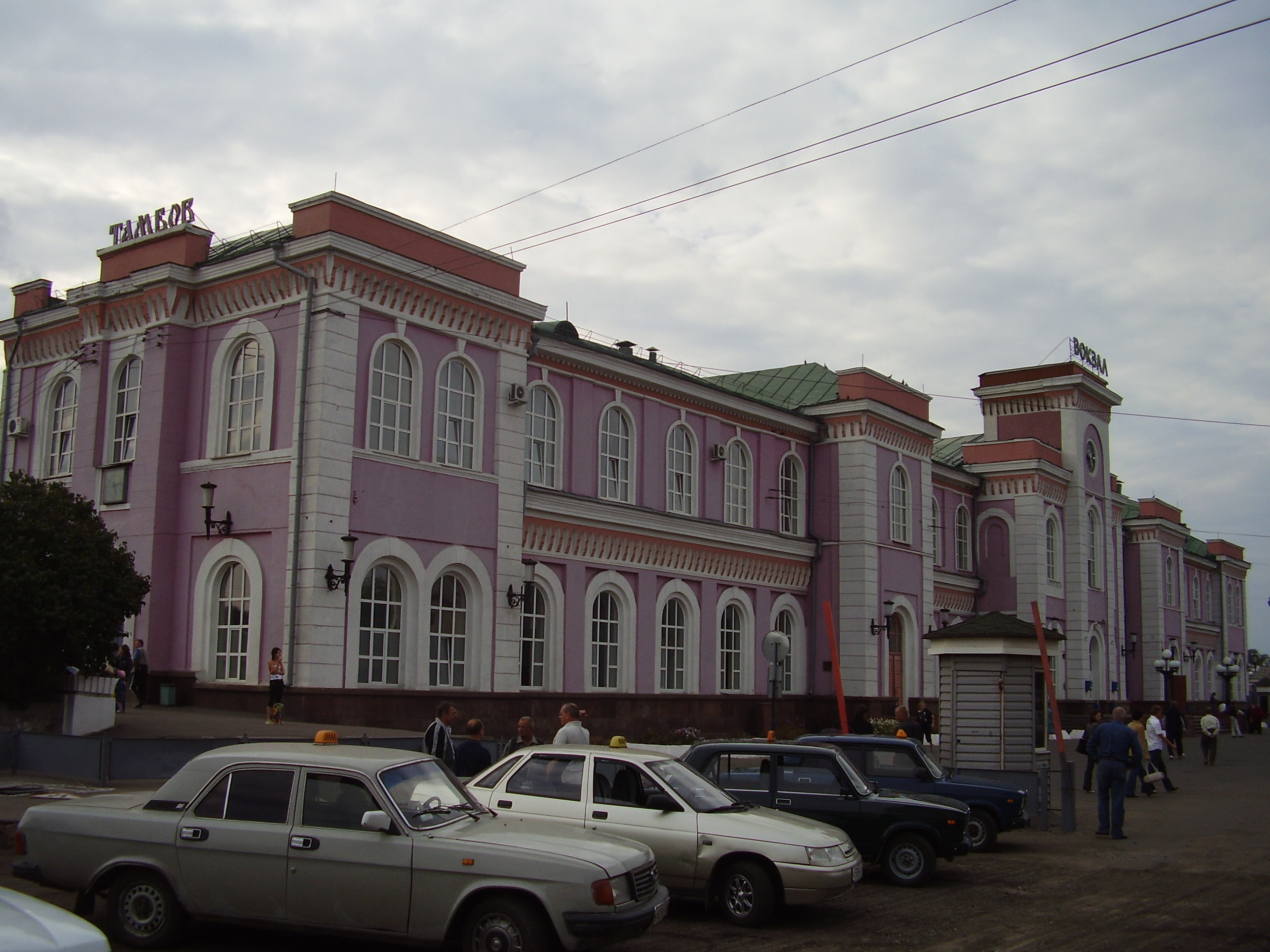 Nádraží v Tambově